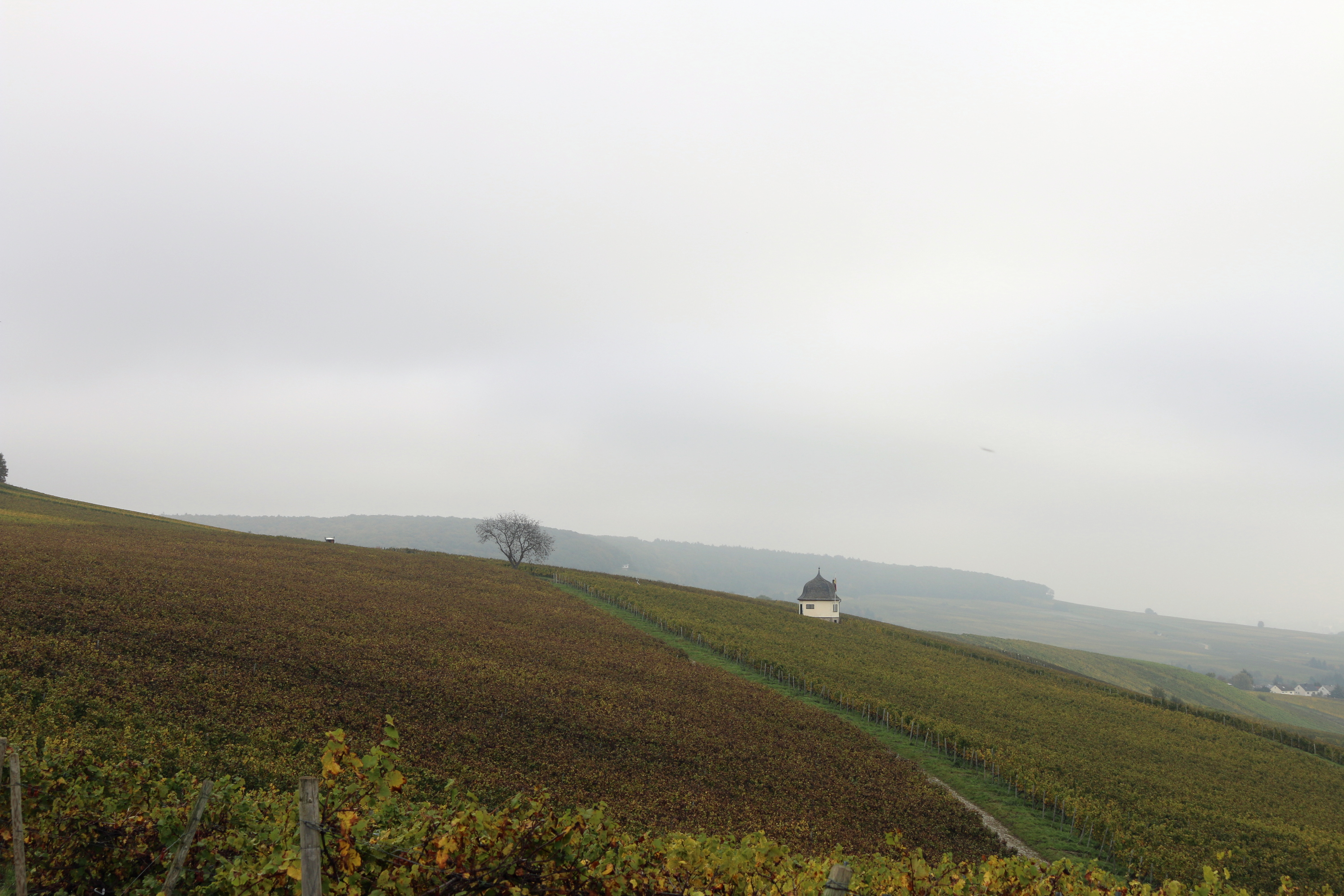 Rauenthal, Eltville, Rheingau: Weinberghäuschen an der Bubenhäuser Höhe, errichtet um 1920